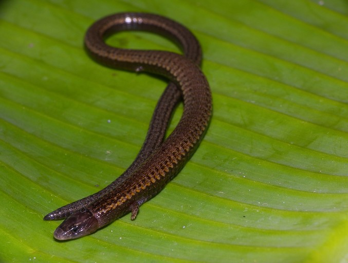 Bachia bicolor